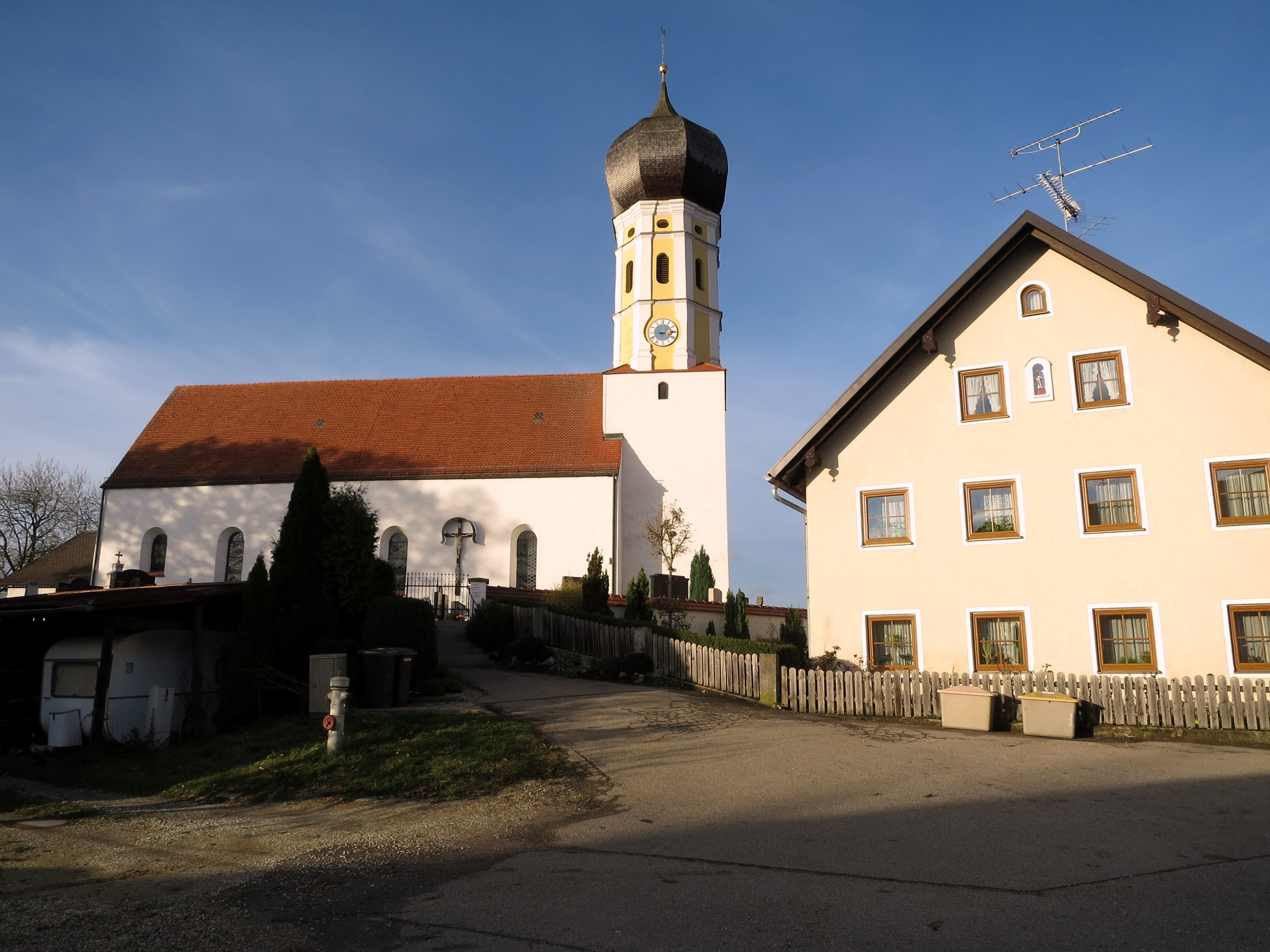 Katholische Pfarrkirche St. Martin Spätromanische ehemalige Chorturmkirche mit gerade schließendem Chorabschluss und Turmobergeschoss mit Zwiebelhaube der 2.Hälfte 17. Jahrhundert, barockes Langhaus von 1762, ausgebaut 1882; mit Ausstattung